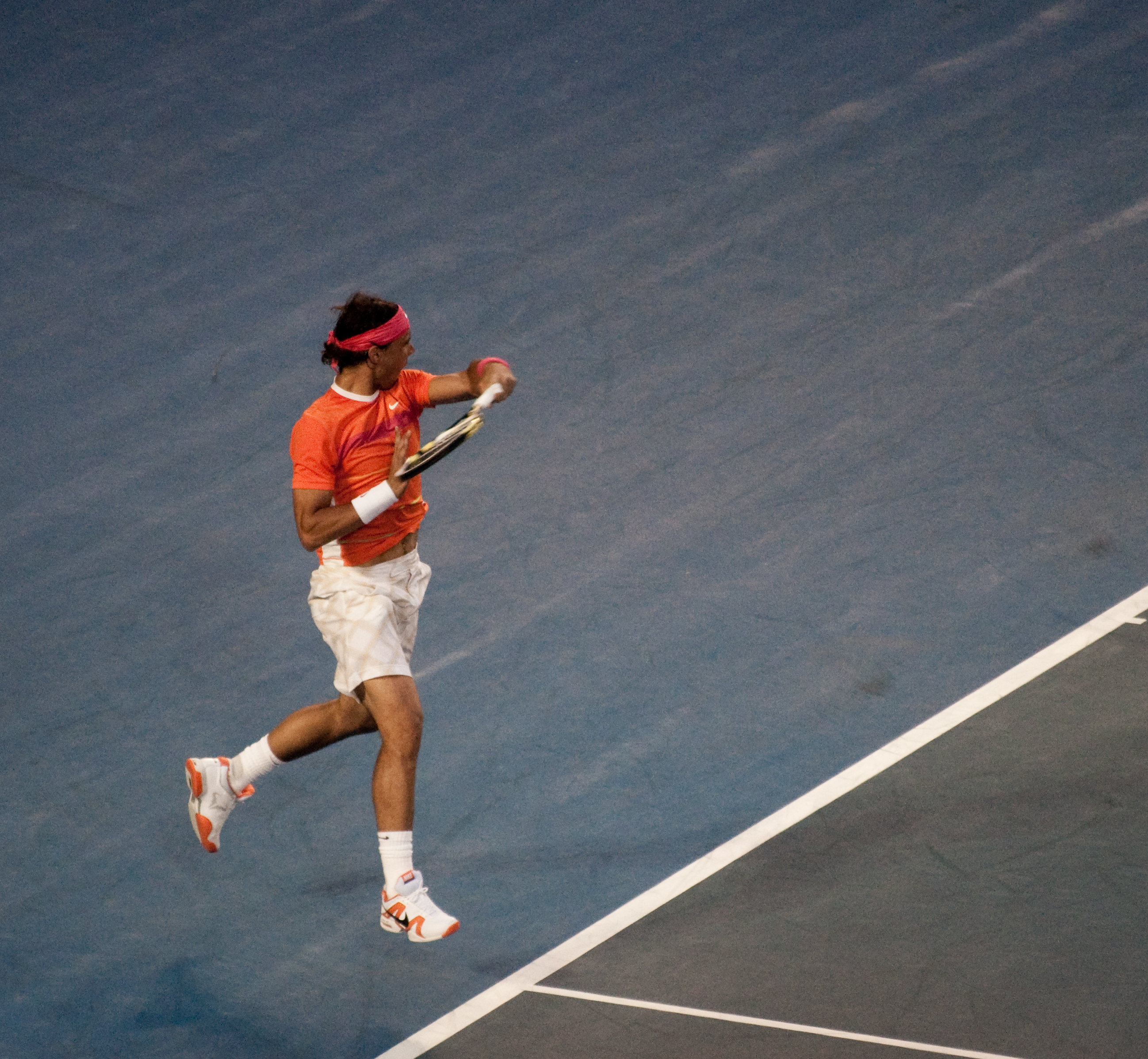 Australian Open 2010 Quarterfinals Nadal Vs Murray